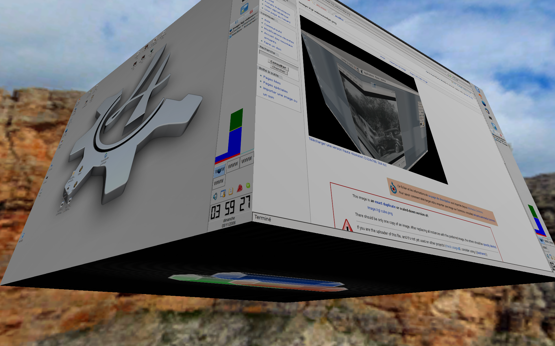 beryl debian sid nvidia 05-11-2006 fr